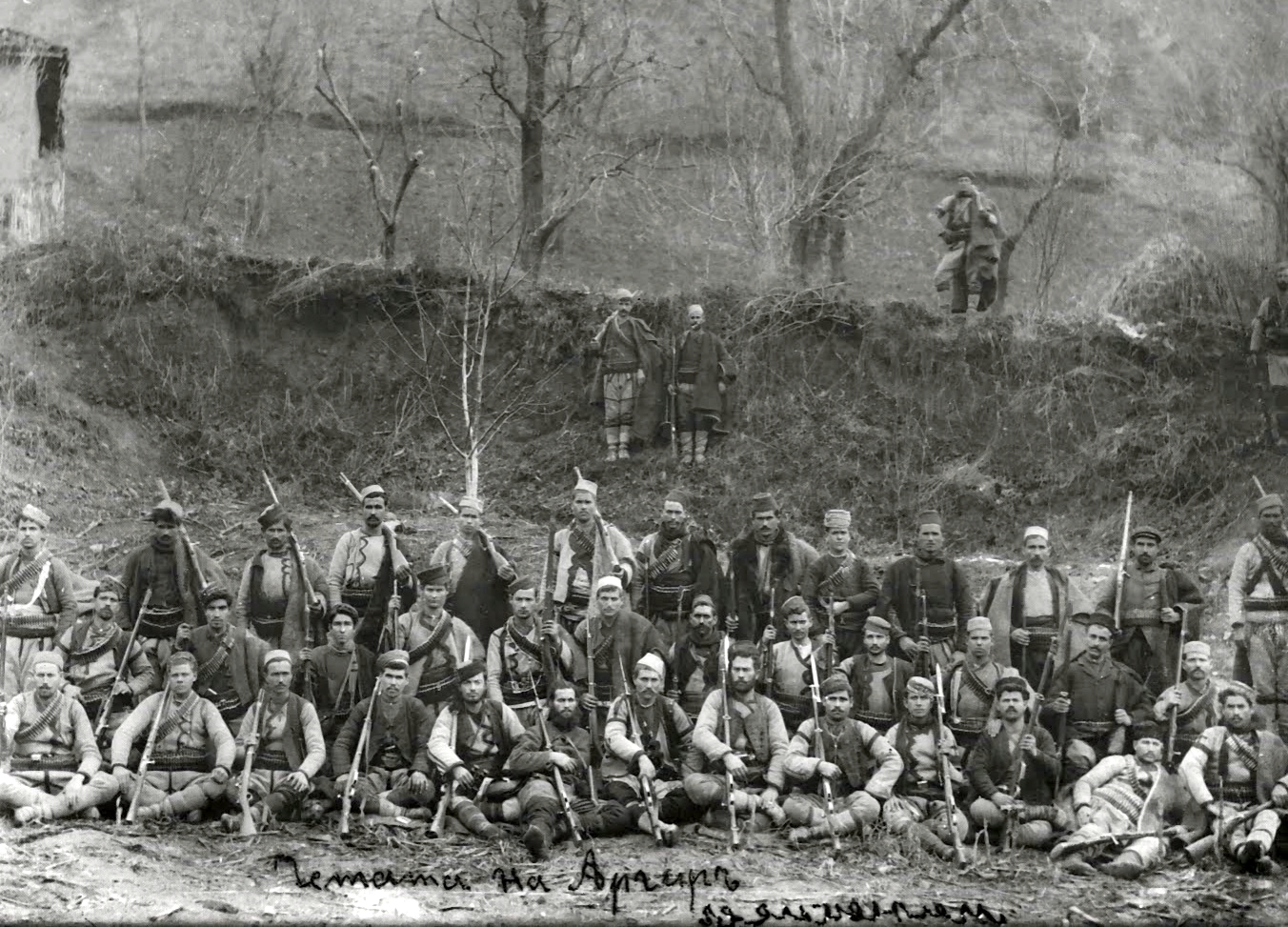 Четата на Аргир Манасиев.